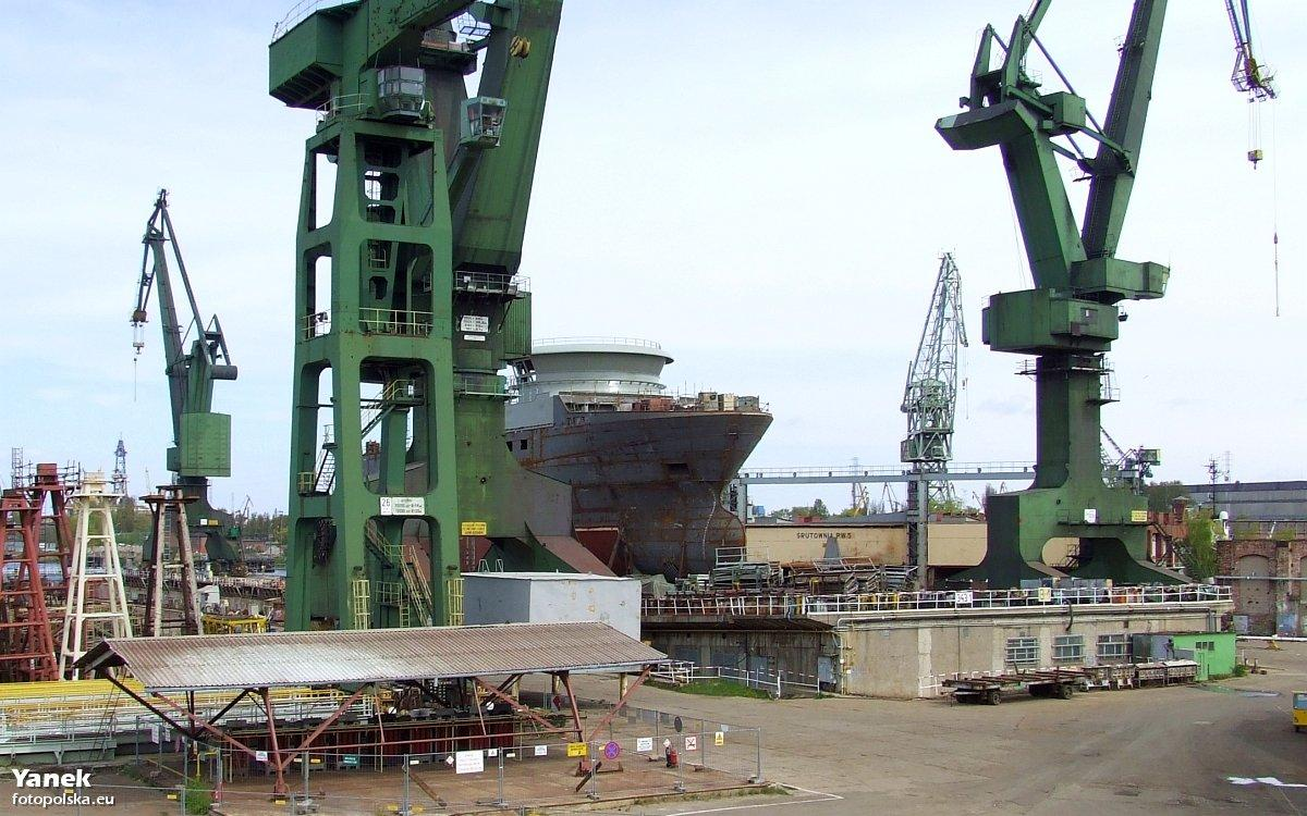 Pochylnia B-1, jedyna dopuszczona przez KE do pracy, w Stoczni Gdańsk SA.